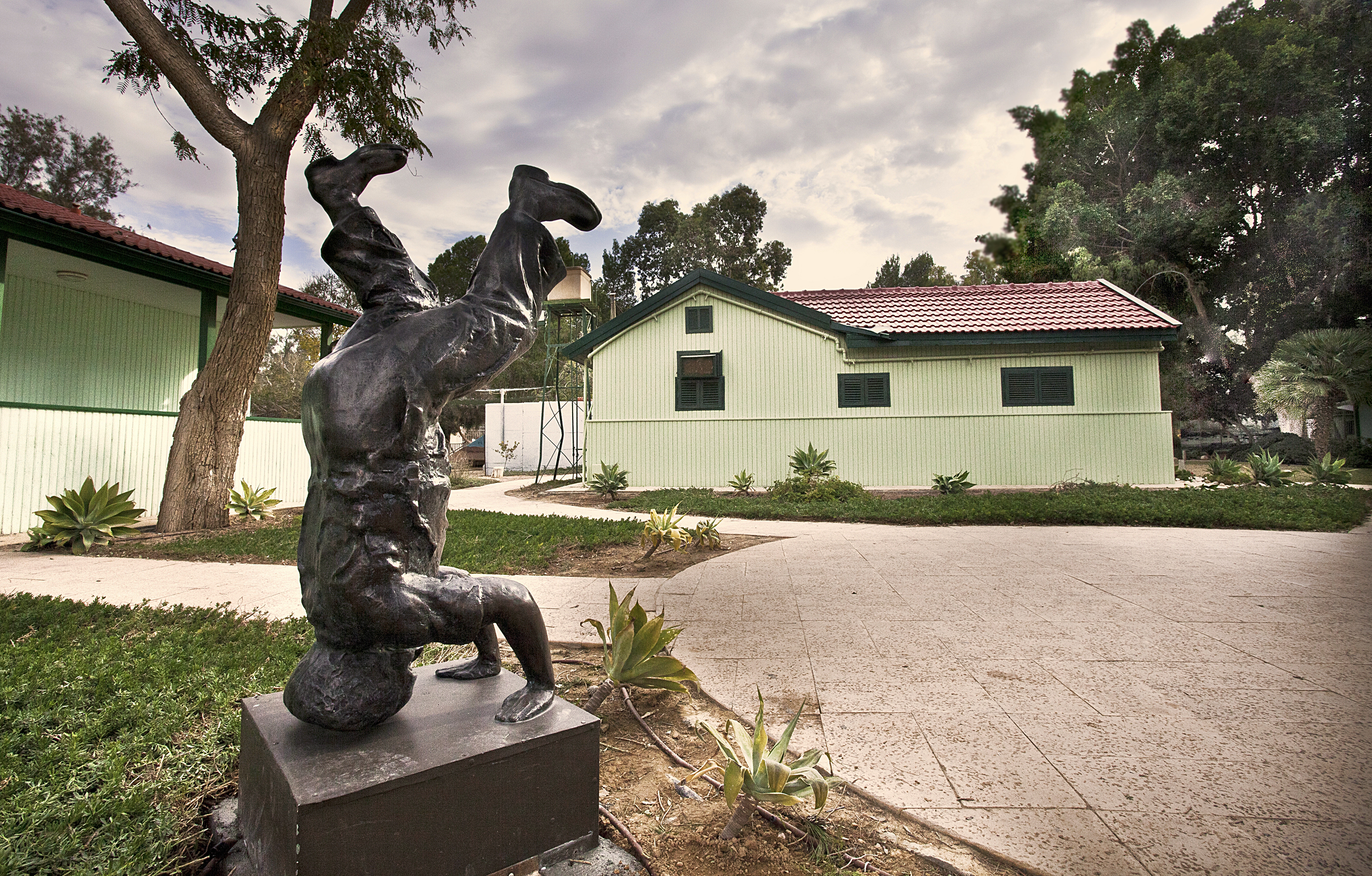 צריף בן-גוריון הוא צריף המגורים בקיבוץ שדה בוקר, אשר שימש את דוד בן-גוריון ואשתו פולה בשנים 1953 - 1973, ואשר הפך לאחר מותו למוזיאון העומד לרשות הציבור, במסגרת המכון למורשת בן-גוריון.